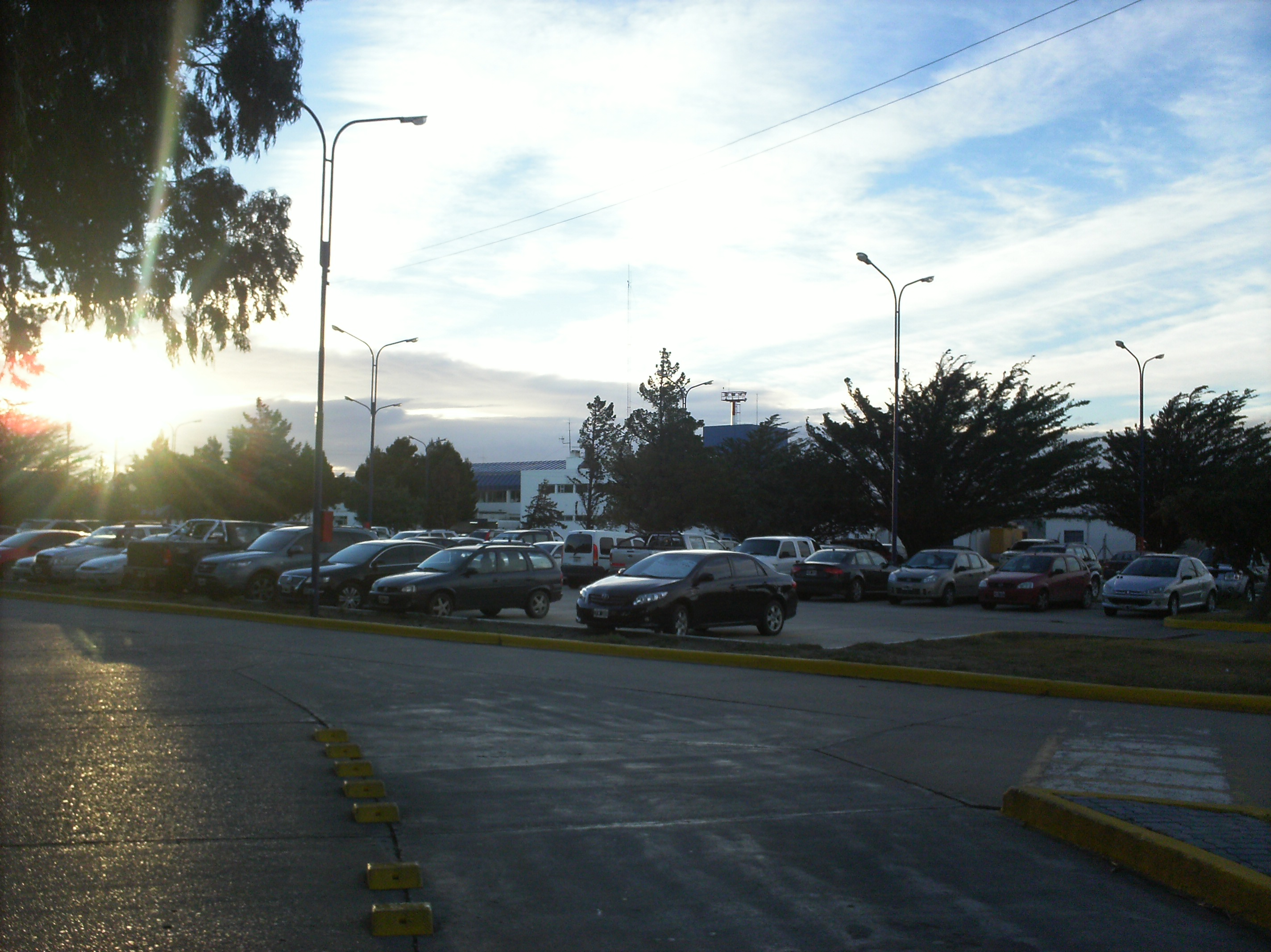 imagen del aereopuerto de comodoro